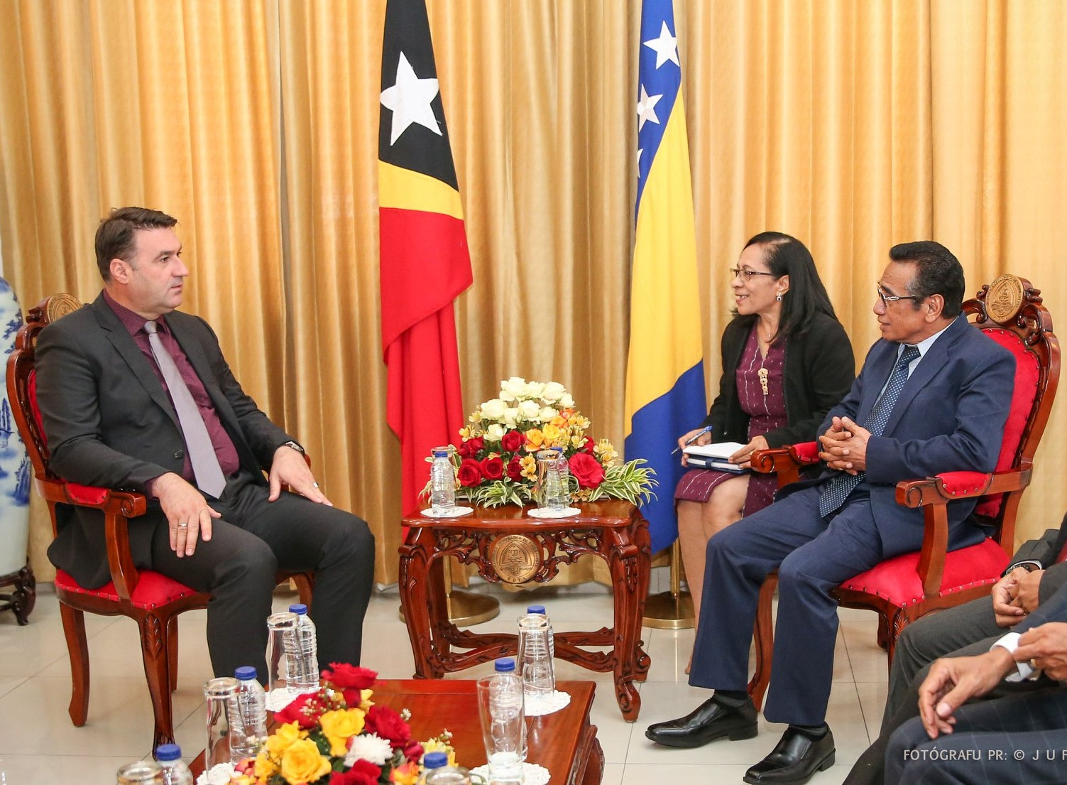 Mehmed Halilović übergibt seine Akkreditierung als BotschafterBosnien und Herzegowinas an Osttimors Staatspräsident Francisco Guterres.